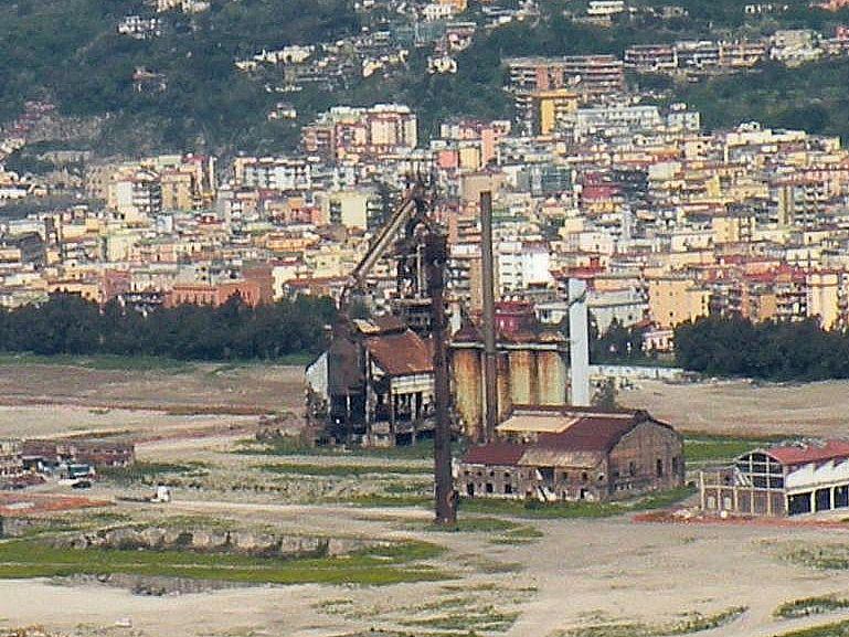 Доменна піч колишнього металургійного заводу у Баньолі у Італії.